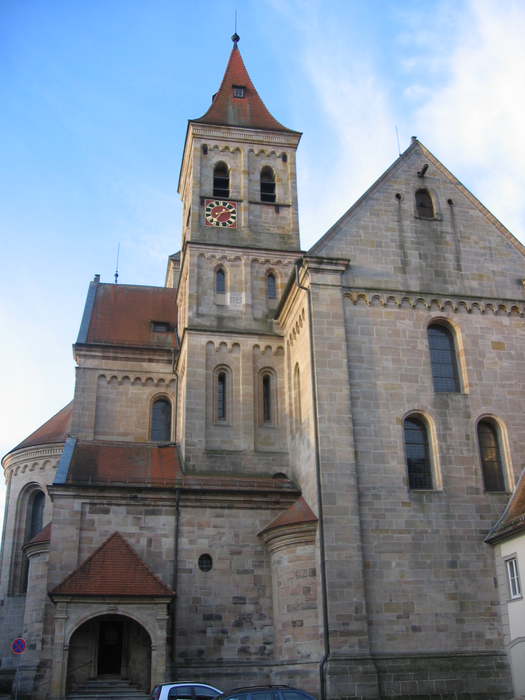 Blick von Norden auf die Stiftskirche